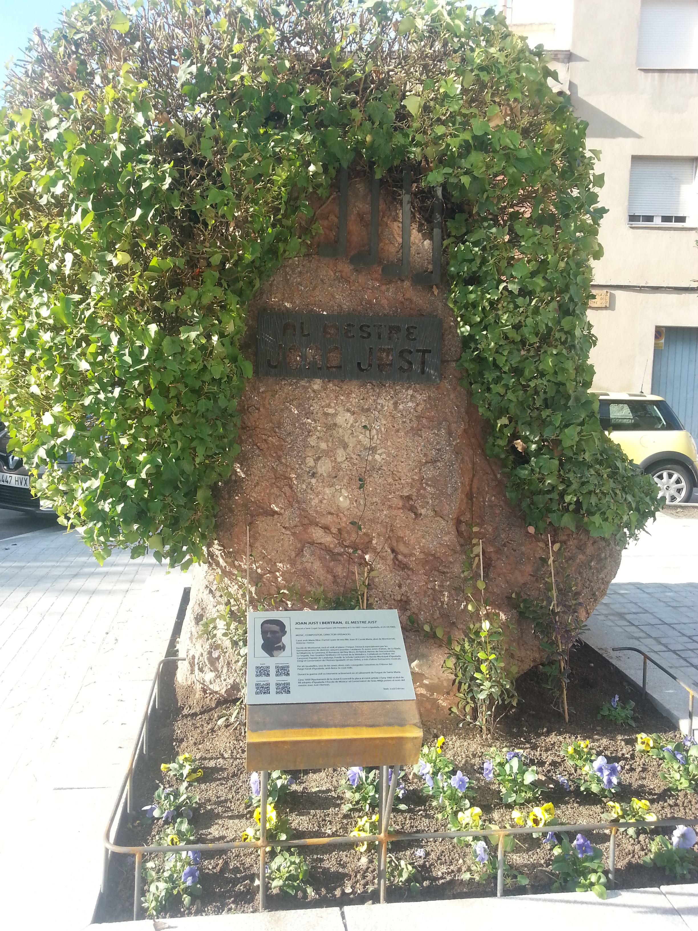 Monument al mestre Just (Joan Just i Bertran) situat a la plaça del Mestre Just, a Igualada. Obres de rehabilitació inaugurades el desembre de 2014.